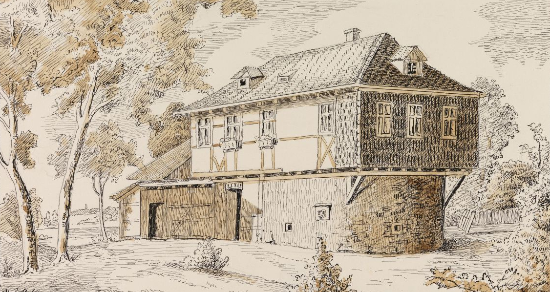 Das Atelierhaus des Pascha Johann Friedrich Weitsch auf dem Inselwall, abgebrochen um 1820. Zeichnung von Joseph Eduard Wessely. Ausschnitt. Bammelsburg.